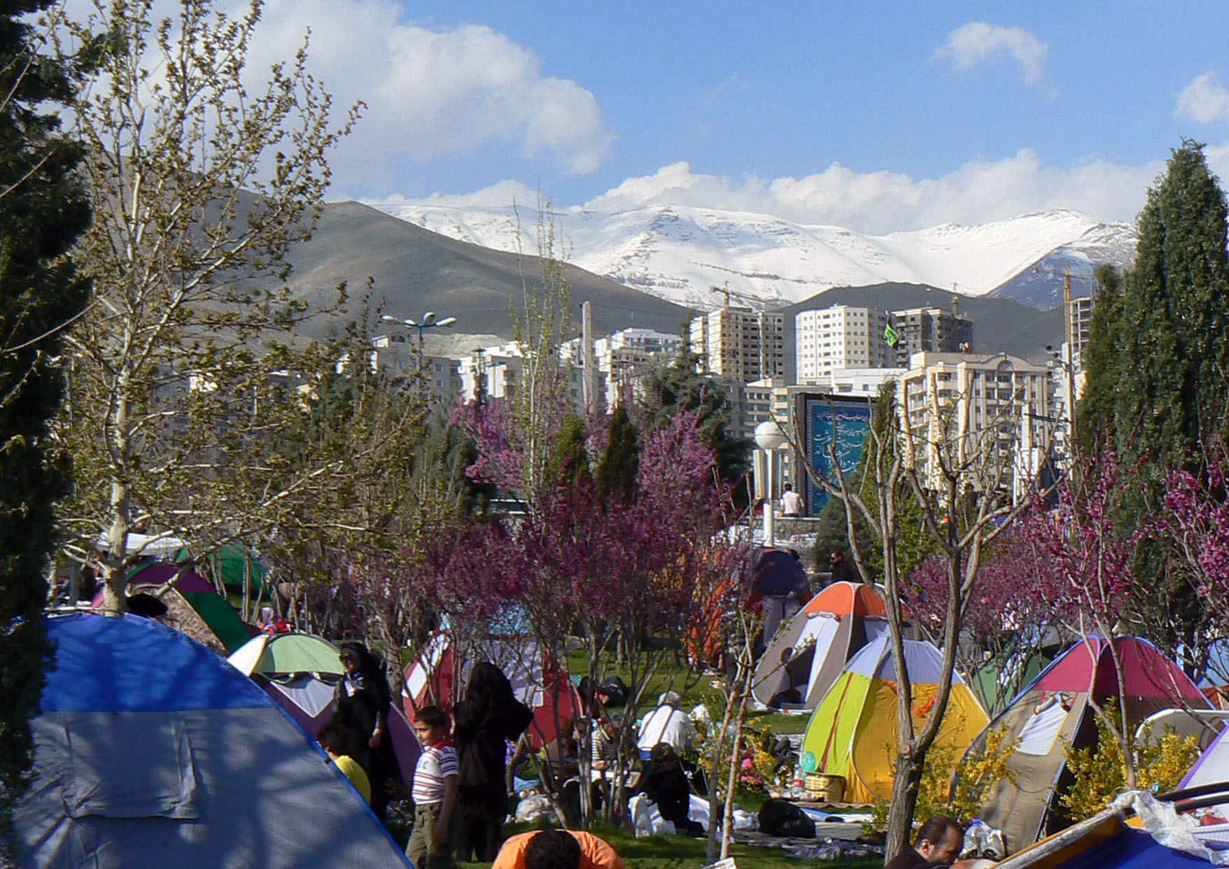 سیزده به در در تهران